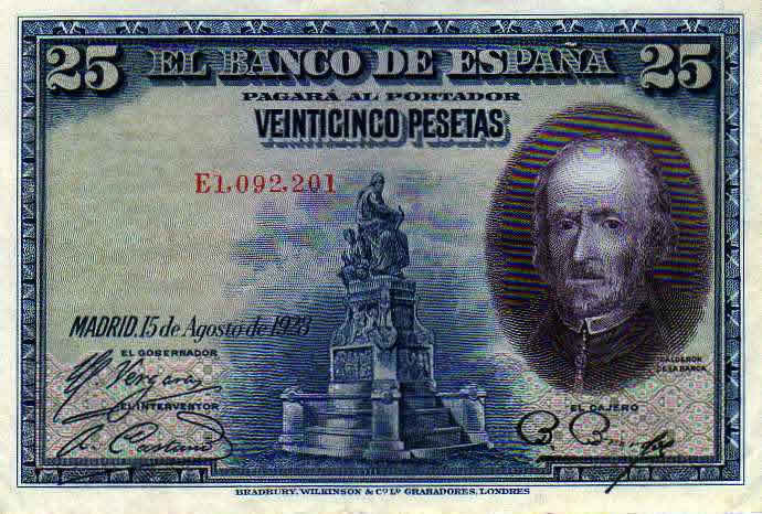 Billet de 25 Pesetas (1928) Dimensions 121 x 80 mm. (Espagne). Recto: Pedro Calderon de la Barca.